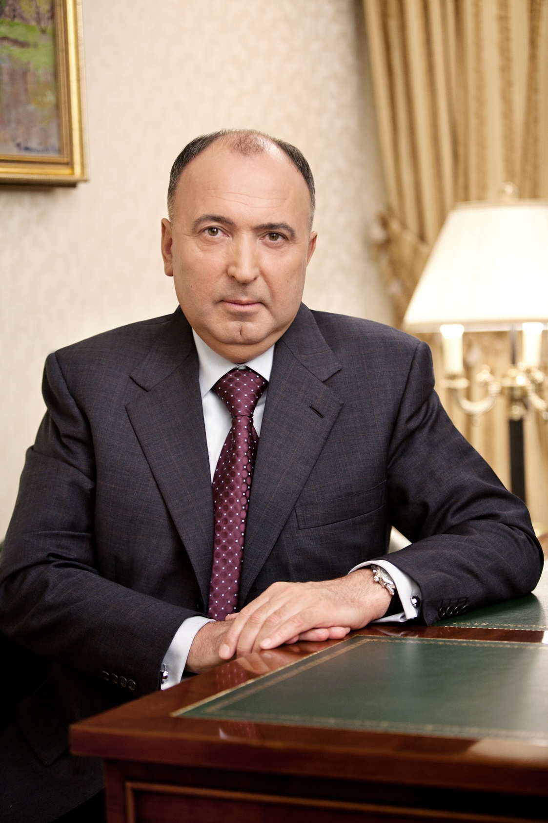 Шаров Ігор Федорович